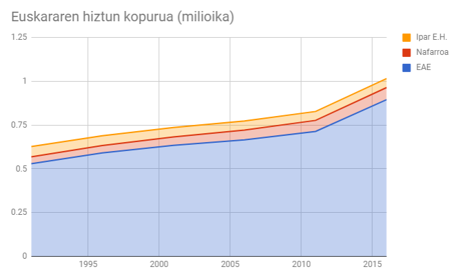 Euskararen hiztun kopurua adierazten da grafiko honetan. Datuak milioikako eskalan jarrita daude. Hartu diren datu guztiak 1991,1996,2001,2006,2011 eta 2016. urteetako ikerketa soziolinguistikoetatik atera dira.